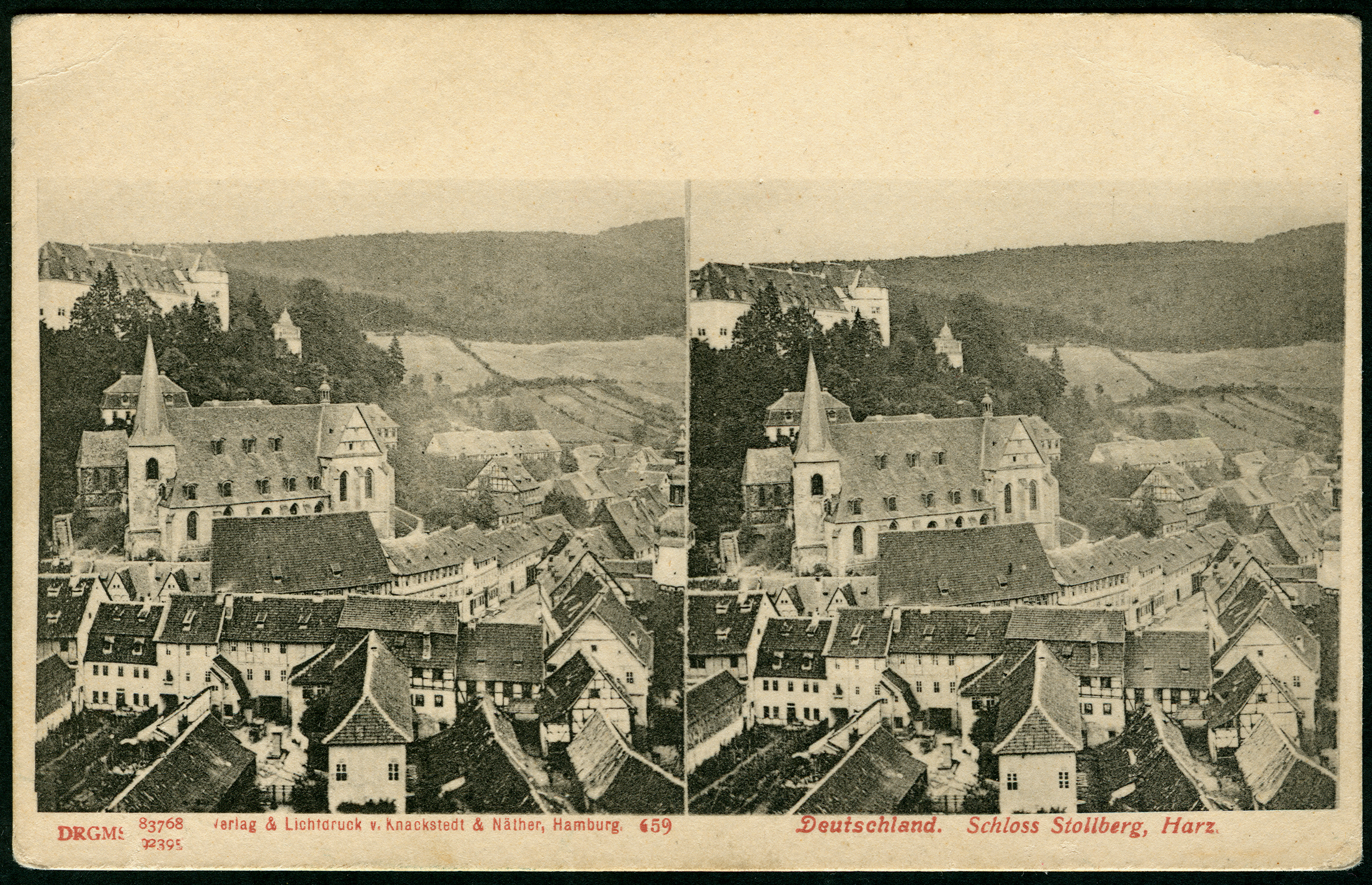 Stereoskopie der Firma Knackstedt & Näther mit der fortlaufenden Nummer 659, hier mit einem Blick von einem erhöhten Aussichtspunkt über die Dächer im Zentrum des Ortes Stolberg im Harz, vorbei am Saigerturm (ganz rechts) über das Straßendreieck am Markt auf den Südflügel der St. Martini-Kirche in Richtung Schloss Stolberg (oben links). Das auf Lichtdruck spezialisierte hamburger Unternehmen (auch: K & N) hatte für ihre stereographischen Ansichtskarten die DRGM-Nummern 83768 und 92395 eintragen lassen. Das Datum dieser Aufnahme, vermutlich auch der Name des Fotografen, wird sich mit Sicherheit bis auf das genaue Tagesdatum und die Tageszeit noch aufklären lassen: Ein (Stereo-)Fotograf um 1900 erregte üblicherweise gerade in einem kleinen Ort wie Stolberg großes Aufsehen, so daß sich in den örtlichen Zeitungen und/oder anderen Dokumenten genauere Hinweise ergeben werden ... Diese Karte wurde dankenswerterweise von Ilse Paul zur Verfügung gestellt, um sie als hochaufgelöstes Digitalisat über Wikimedia Commons nachhaltig allen Menschen zur Verfügung zu stellen ...